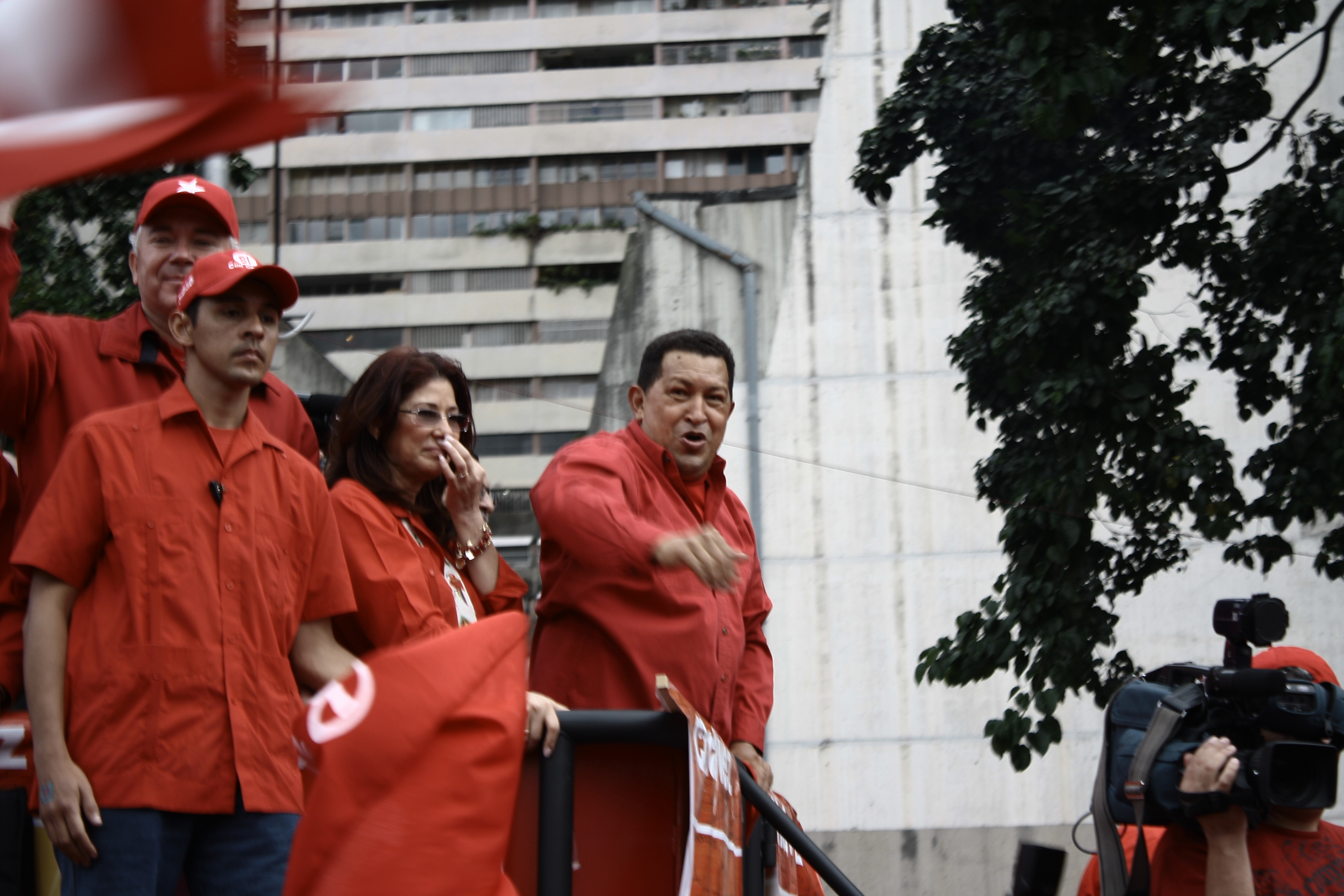 Hugo Chavez en una concentracion politica con Cilia Flores.